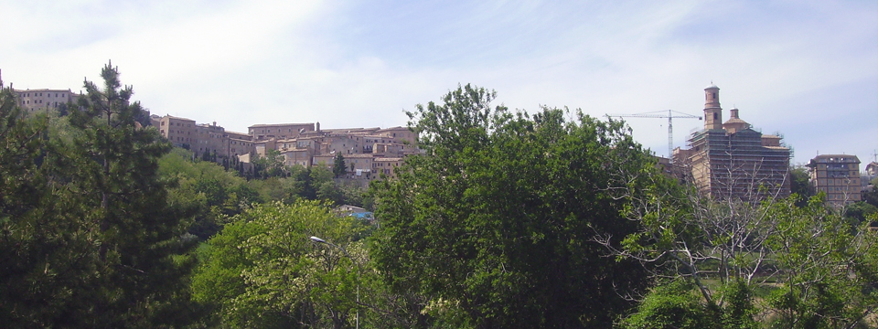 General view of Montalto delle Marche (Ascoli Piceno)